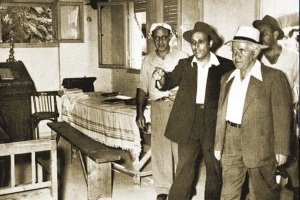 ראש הממשלה דוד בן גוריון במבואת הכניסה לביתו של החזון איש בבני ברק